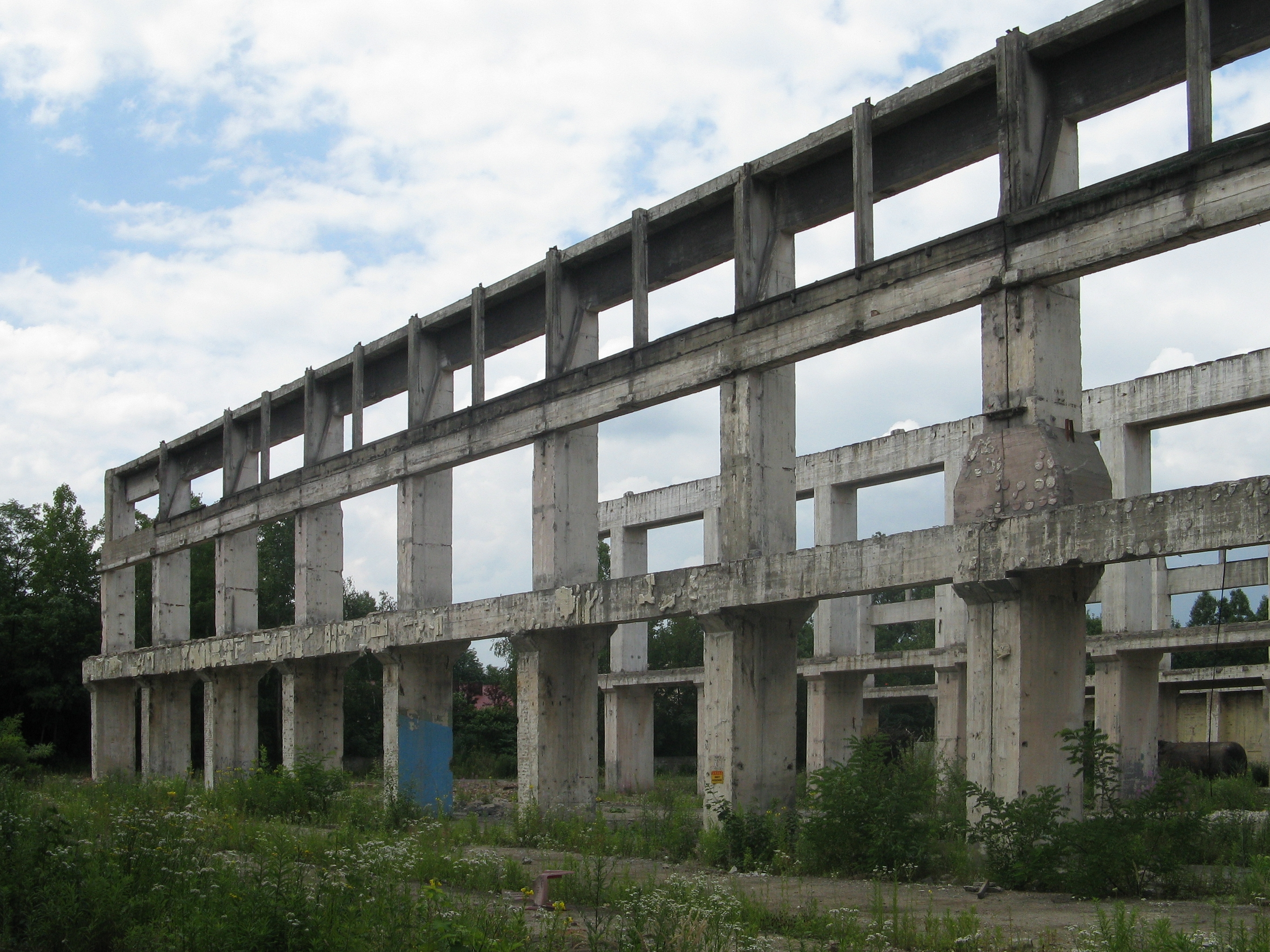 Pozostałości zabudowań hali ZUT Zgoda w Świętochłowicach-Zgodzie, ul. Wojska Polskiego.